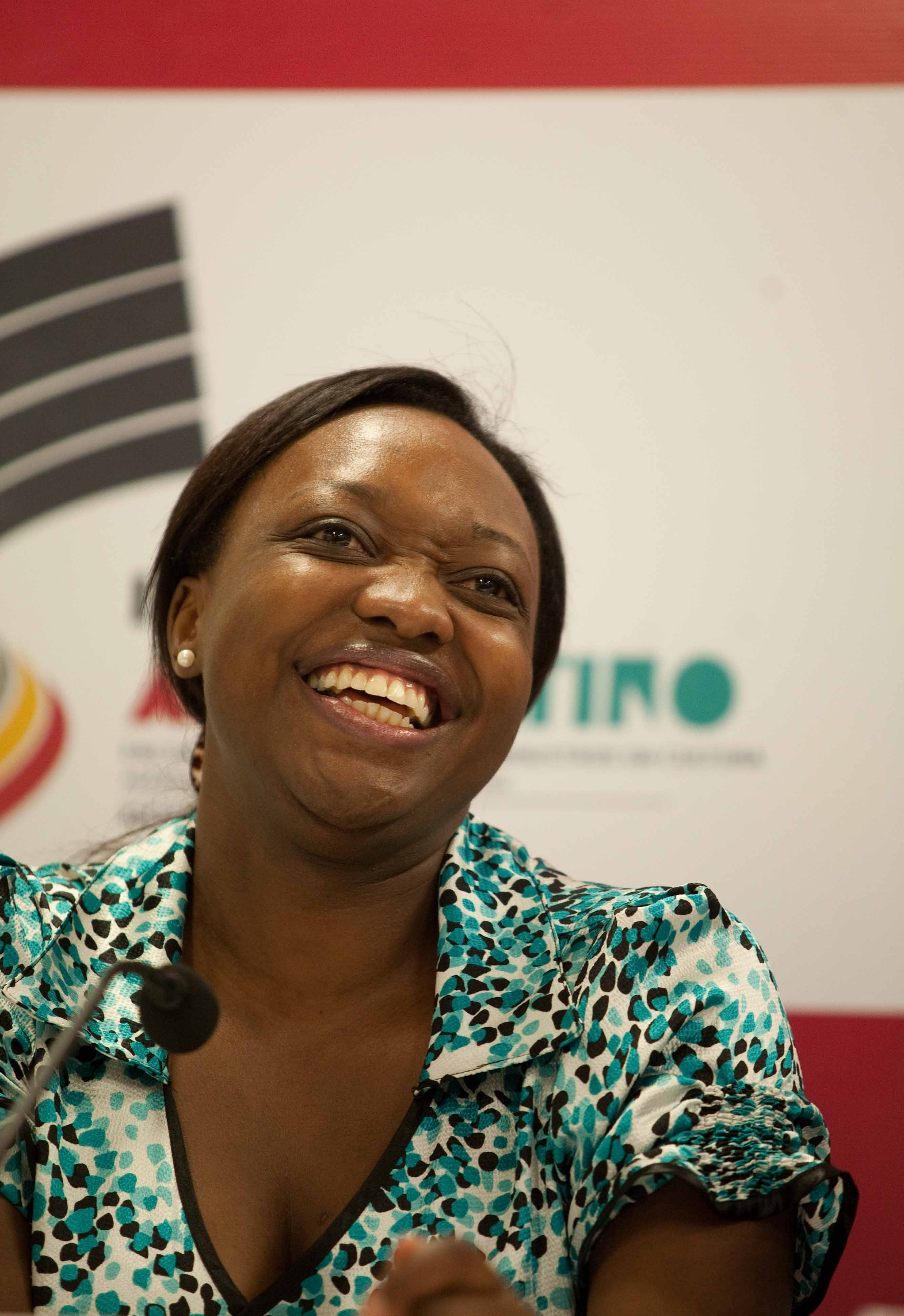 Coletiva de Imprensa com Paula Zapata (Ministra de Cultura da Colômbia), Juca Ferreira (Ministro da Cultura do Brasil), Zulu Araújo (Presidente da Fundação Palmares) e Erica Silva (Ministra da Cultura do Equador)